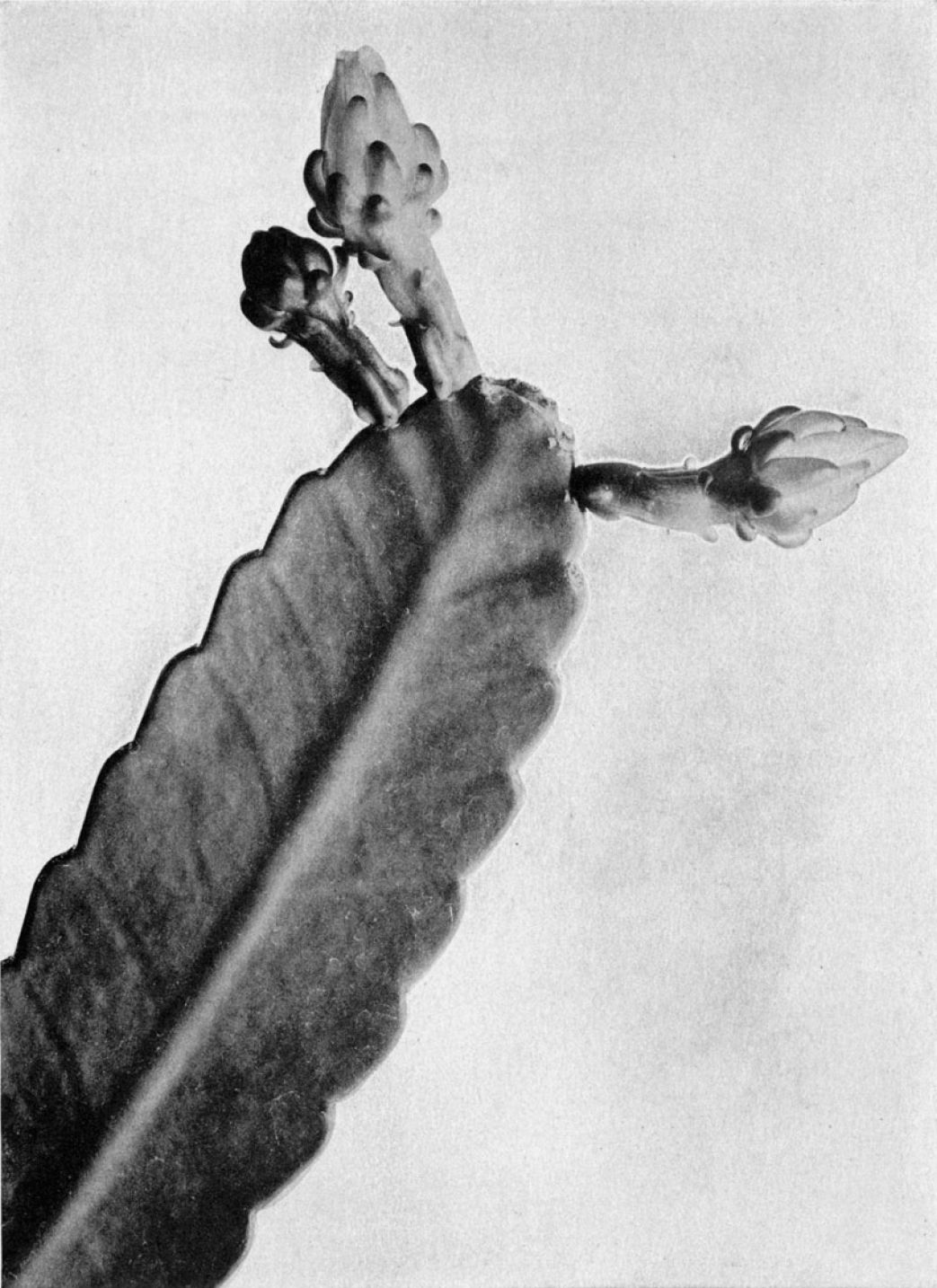 Weberocereus bradei (Hylocereeae; Cactaceae; Planta) Nathaniel Lord Britton és Joseph Nelson Rose "The Cactaceae" c. könyvéből Eccremocactus bradei néven